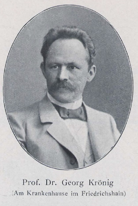 Georg Kroenig (oder Krönig), deutscher Mediziner und Hochschullehrer,(1856-1911).